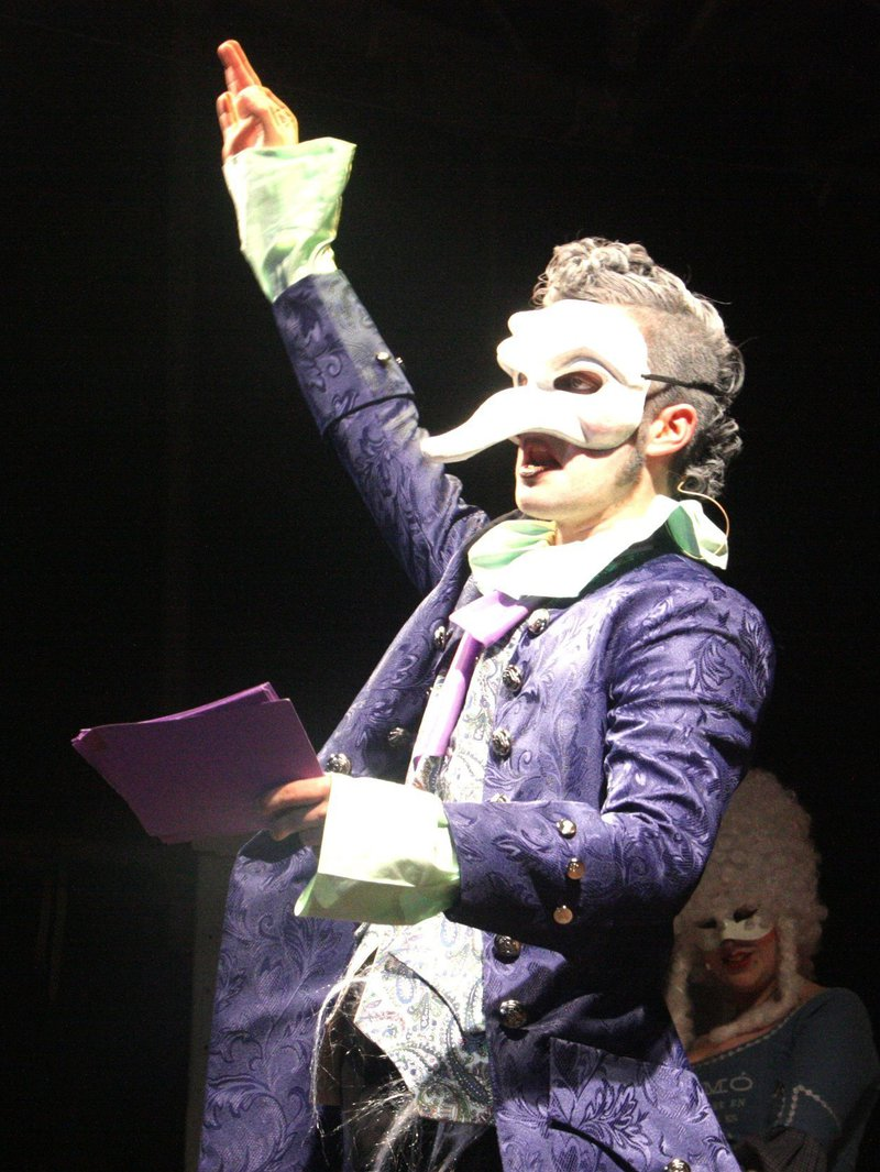 Sa Majestat el Rei Carnestoltes a Vilanova i la Geltrú l'any 2015